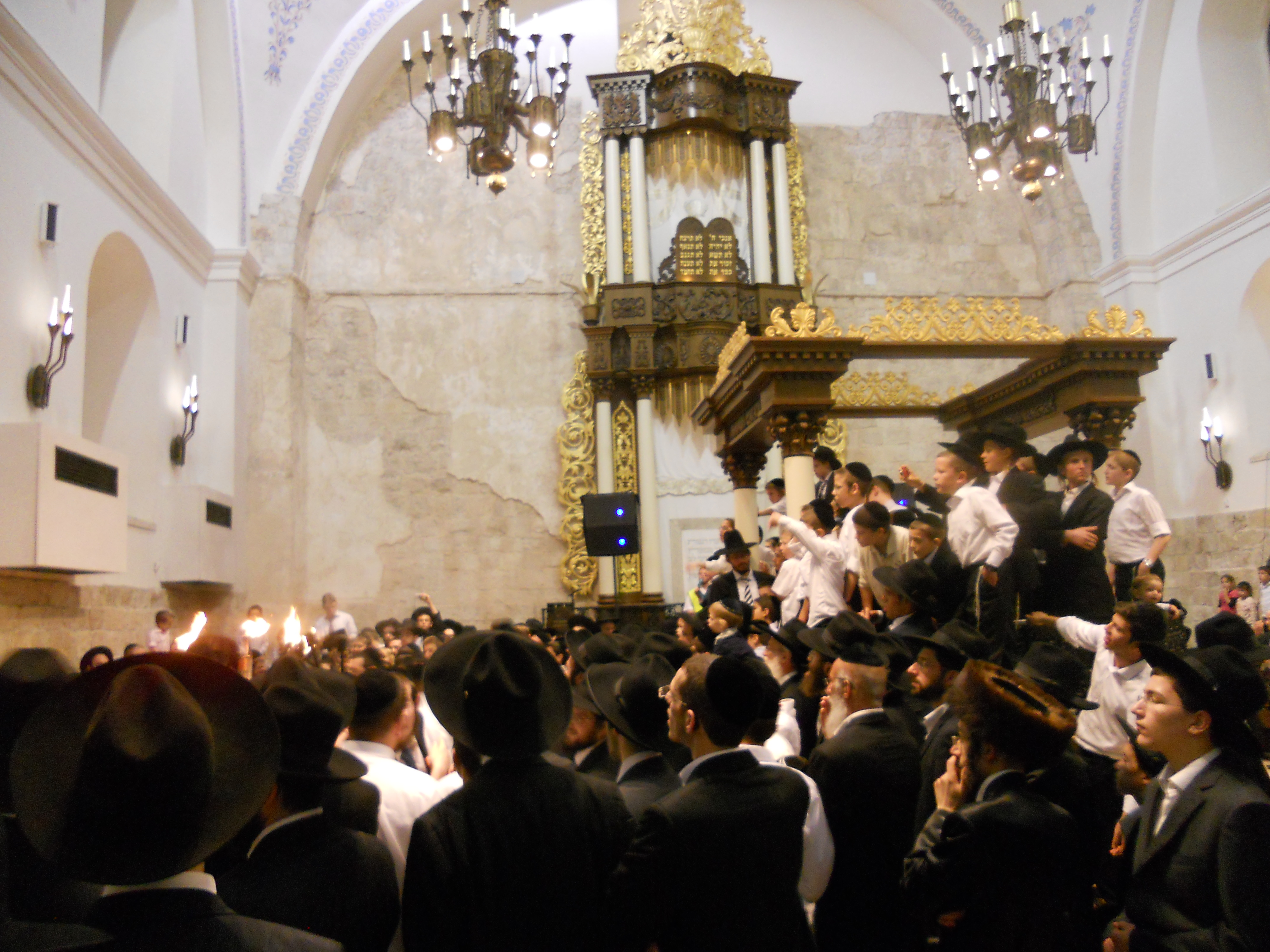 שמחת בית השואבה בבית כנסת החורבה עם לפידי אש